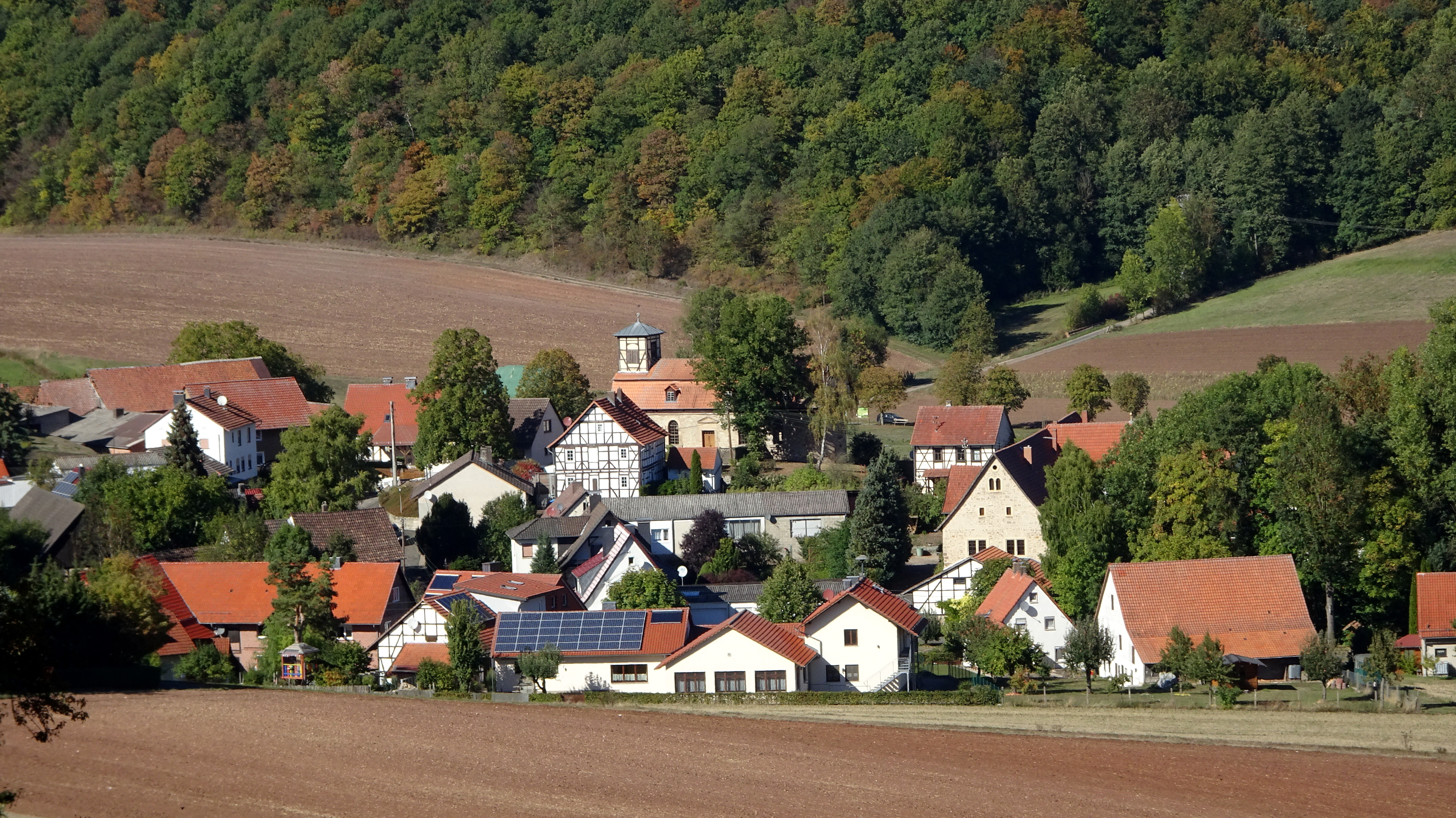 Blick auf Lüderbach mit Kirche und Schloss. Die evangelische Kirche (Bildmitte) wurde zwischen 1329 und 1445 als Wehrkirche erbaut. Einige Mauerreste werden bis ins 12. Jahrhundert datiert. Heute ist sie als Pilger- und Radwegekirche zertifiziert. Das ehemalige Schloss der Herren von Capellan (westlicher Ortsrand) wurde um 1560 vom Geschlecht der Treusche von Buttlar erbaut Kirche und Schloss sind Kulturdenkmale aus künstlerischen, geschichtlichen und städtebaulichen Gründen. Lüderbach ist ein Ortsteil der Gemeinde Ringgau im nordhessischen Werra-Meißner-Kreis.